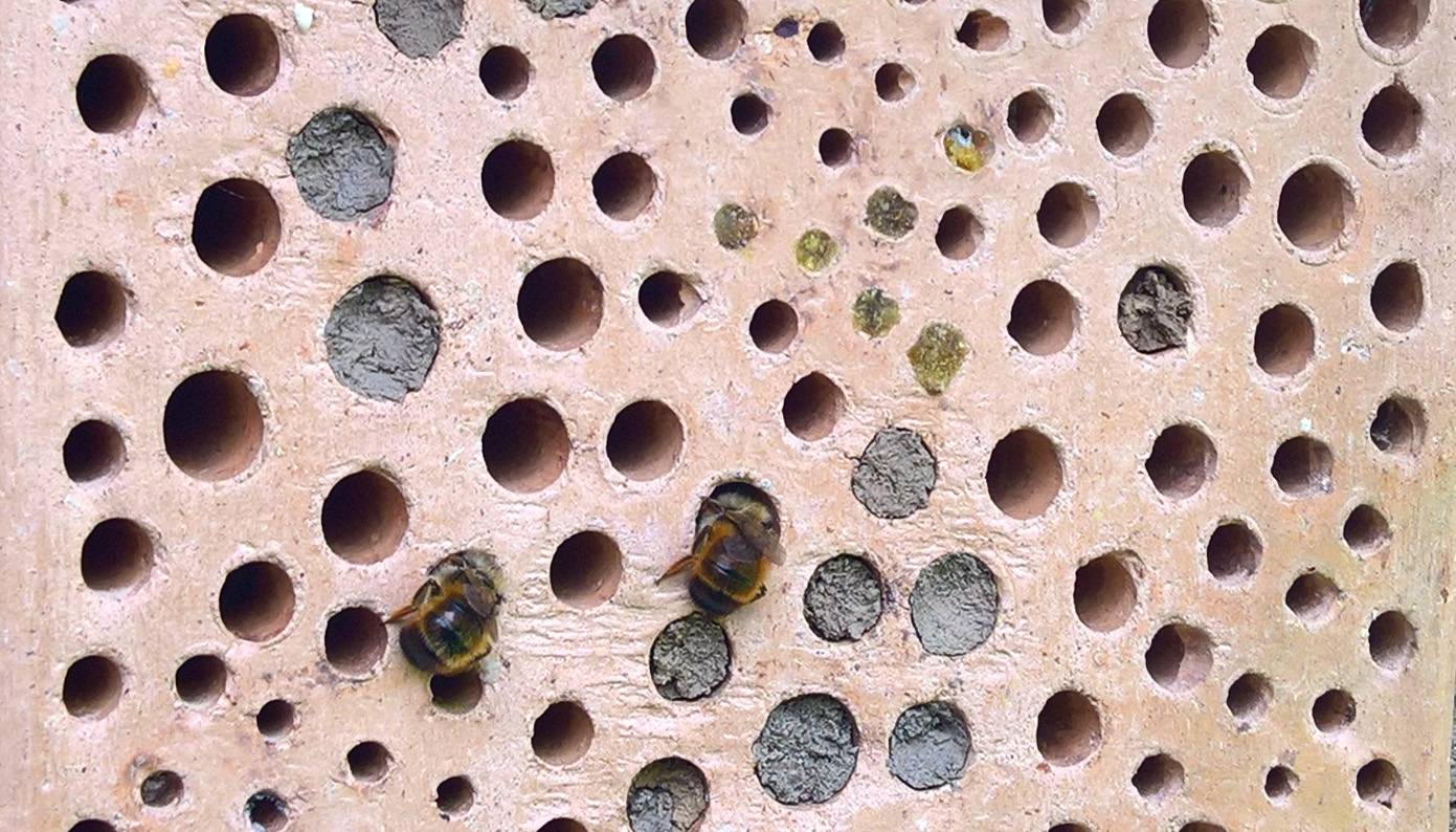 Mauerbienen bei der Arbeit, andere Bienen habe die Niströhren schon fertig, mach beachte die anderen Materialien beim Abschluss Nisthilfe von